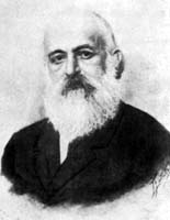 Giovan battista cavalcaselle, XIX century